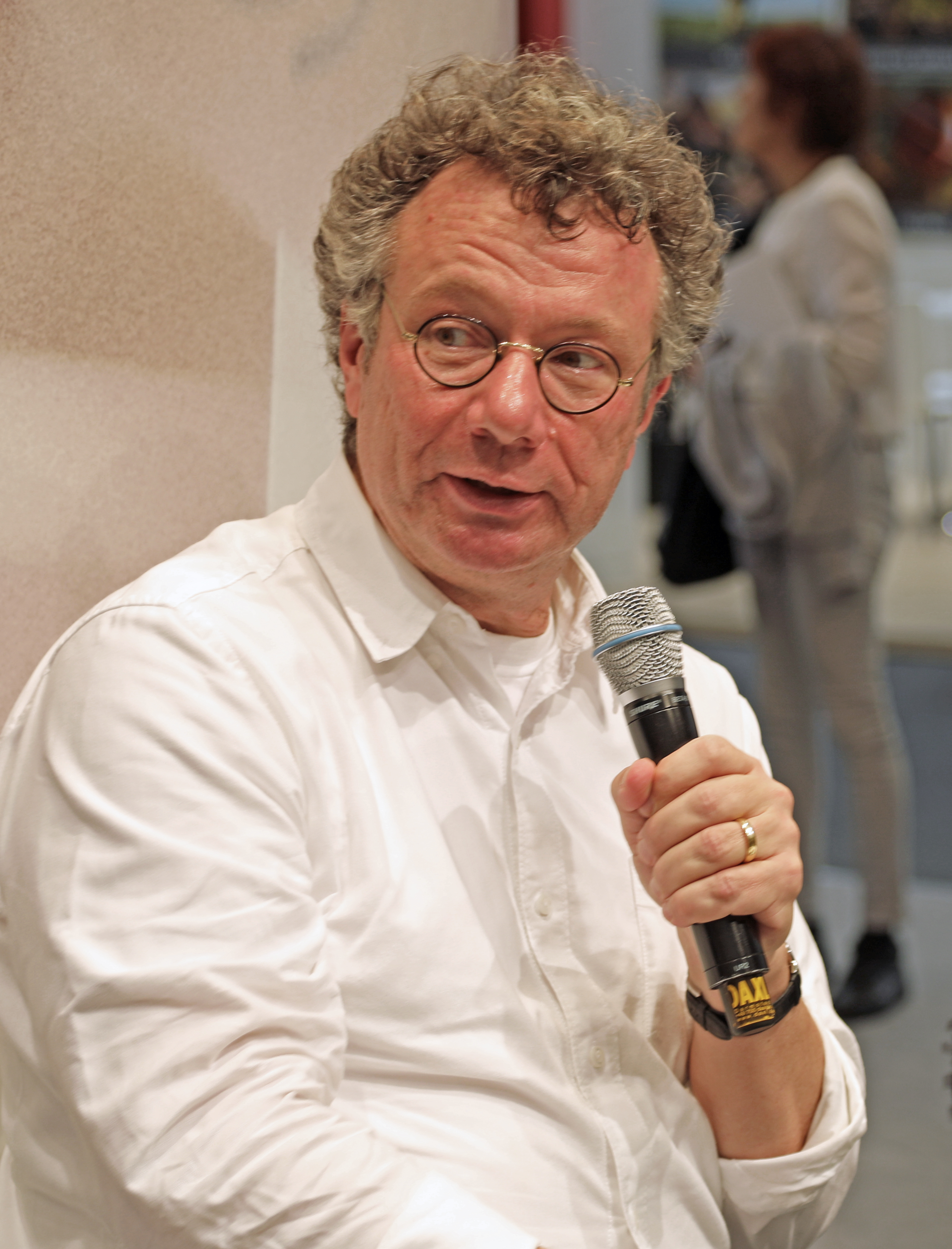 Ingo Schulze bei der Frankfurter Buchmesse 2017, während eines Gesprächs mit Franziska Augstein und Zuschauern.